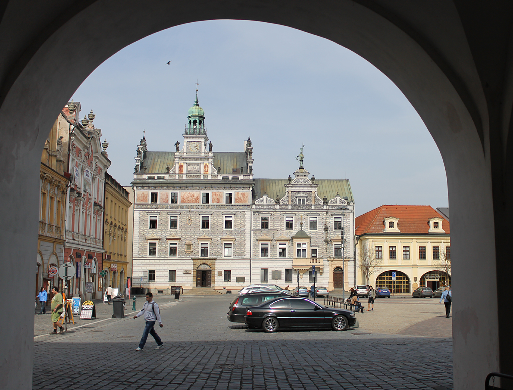 Sloup se sochou Panny Marie Immaculaty se čtyřmi sochami světců, Karlovo náměstí, Kolín I, Kolín.